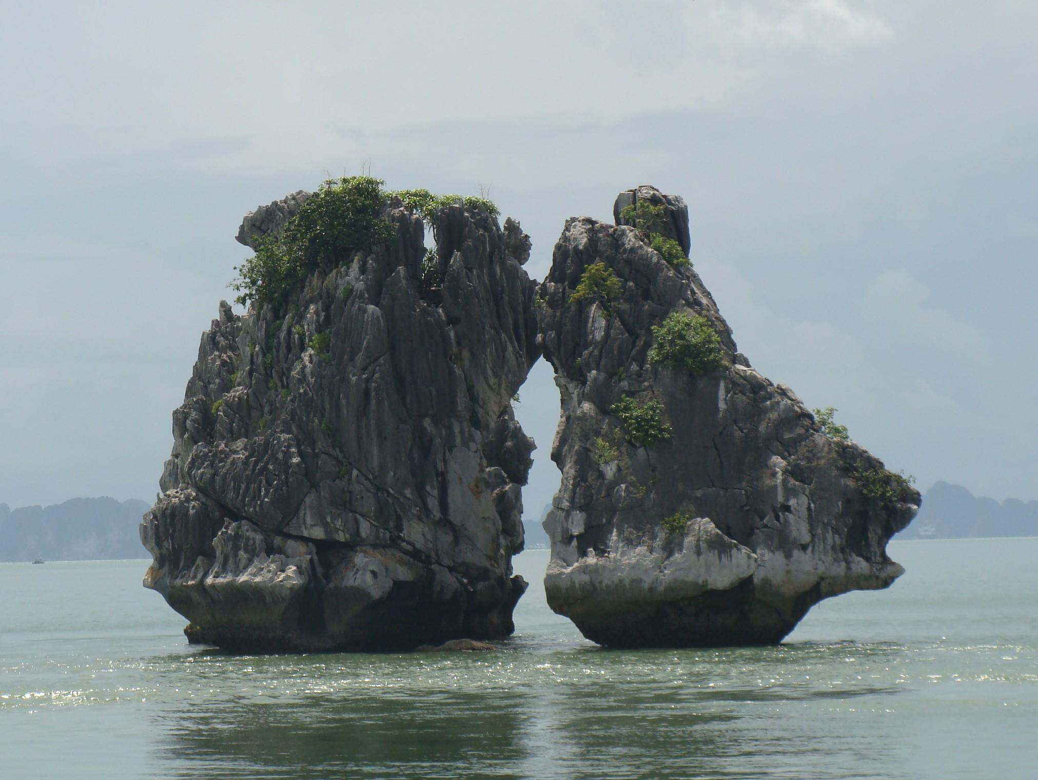 鬥雞石01